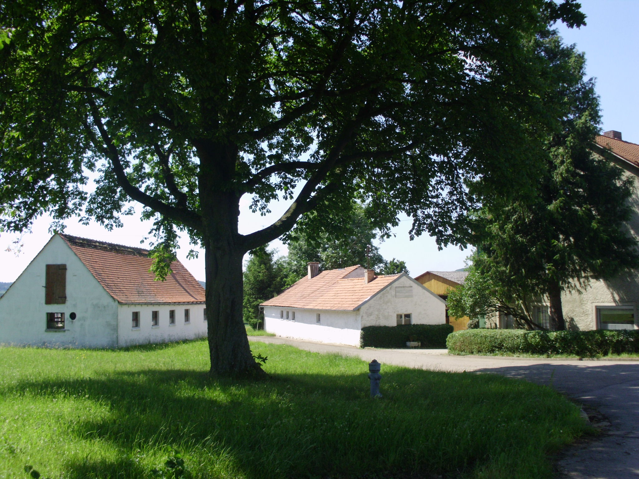 Neuheim, Ortsteil von Treuchtlingen im mittelfränkischen Landkreis Weißenburg-Gunzenhausen